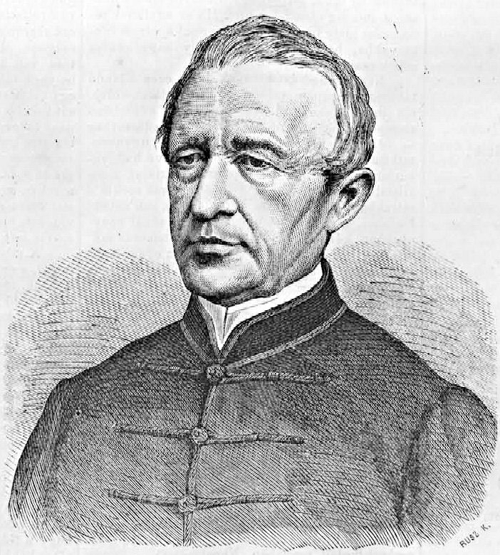 Czuczor Gergely (1800–1866) magyar bencés szerzetes, költő, nyelvtudós (Rusz Károly metszete megjelent a Vasárnapi Ujság 1866. szeptember 16-ai számában)